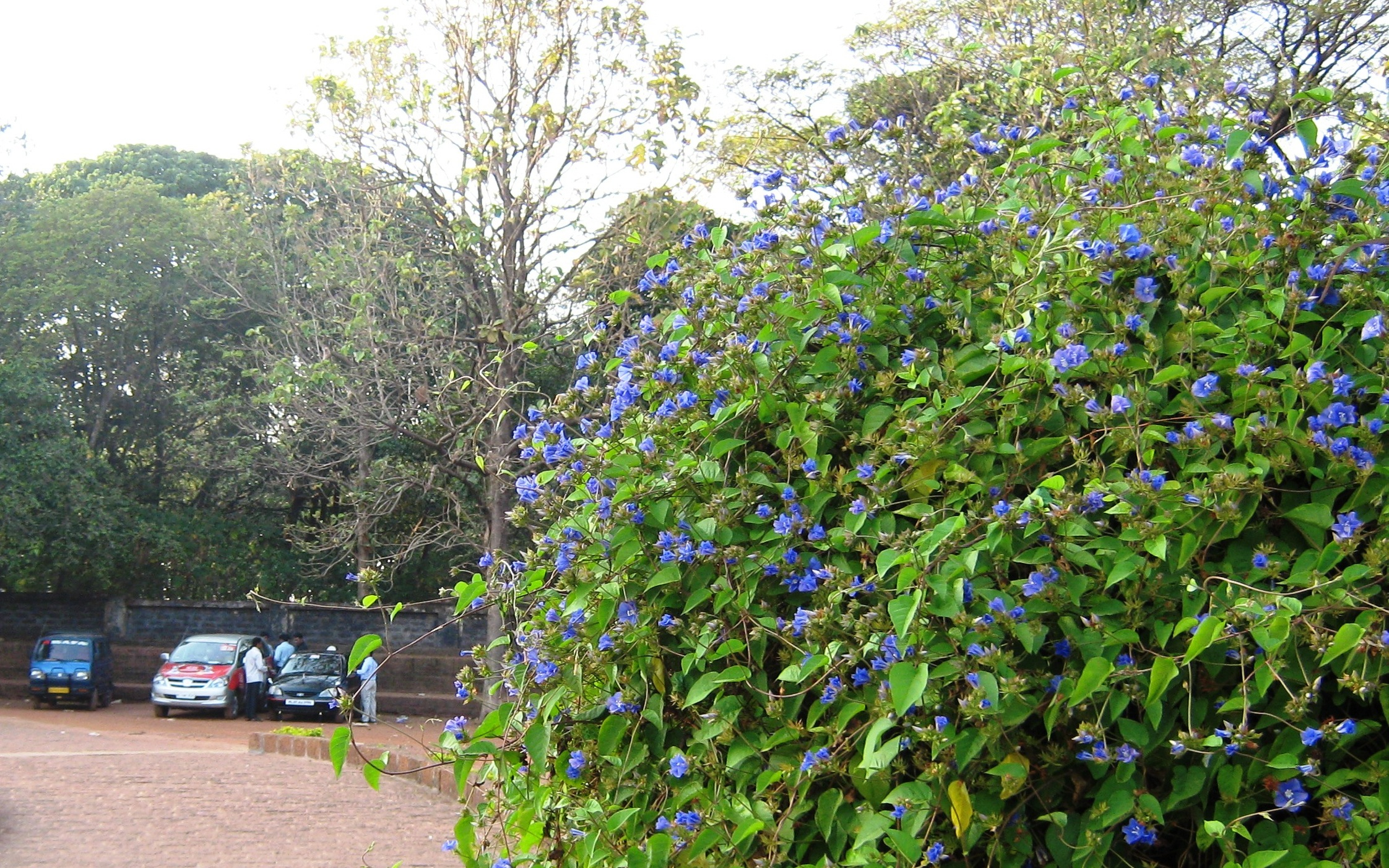 Kannur, Kerala, India.